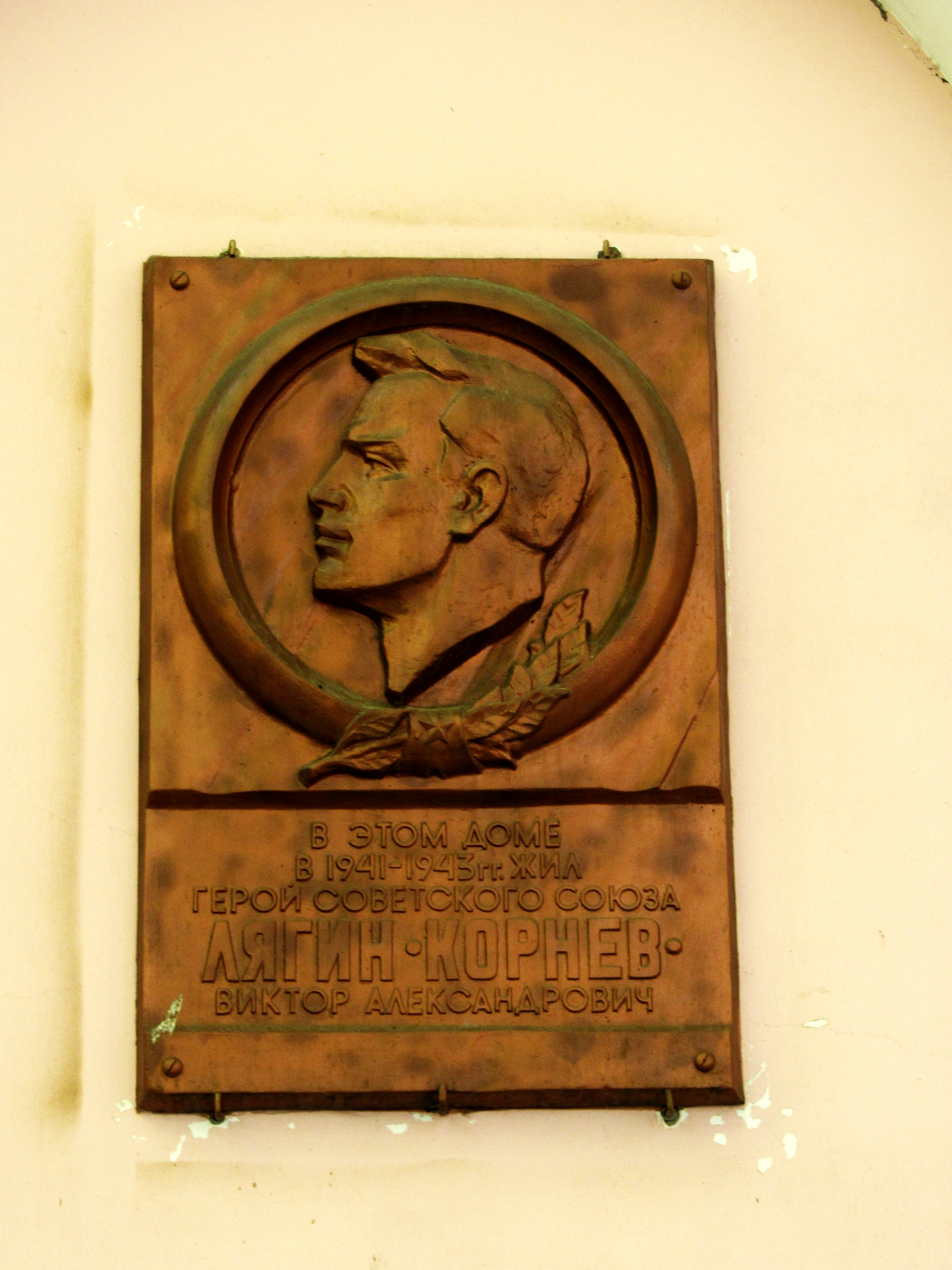 Будинок, в якому в 1941 – 1943 рр. мешкав розвідник, Герой Радянського Союзу В.О.Лягін. (табличка)